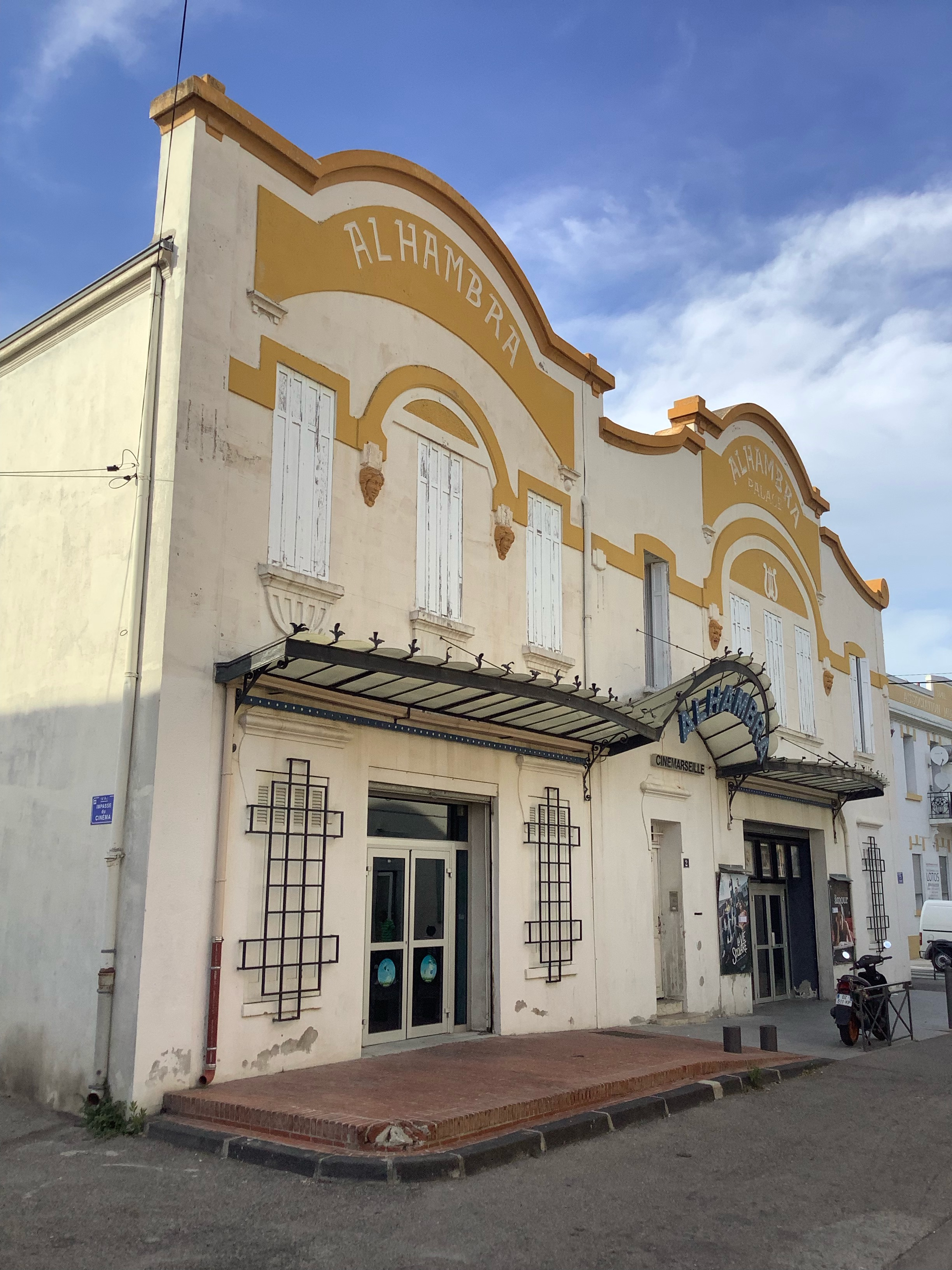 Cinéma Alhambra. l'Estaque, France